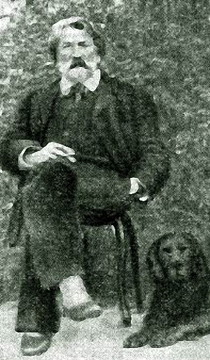 Фотография Д. Кувшинникова. Нач. XX века